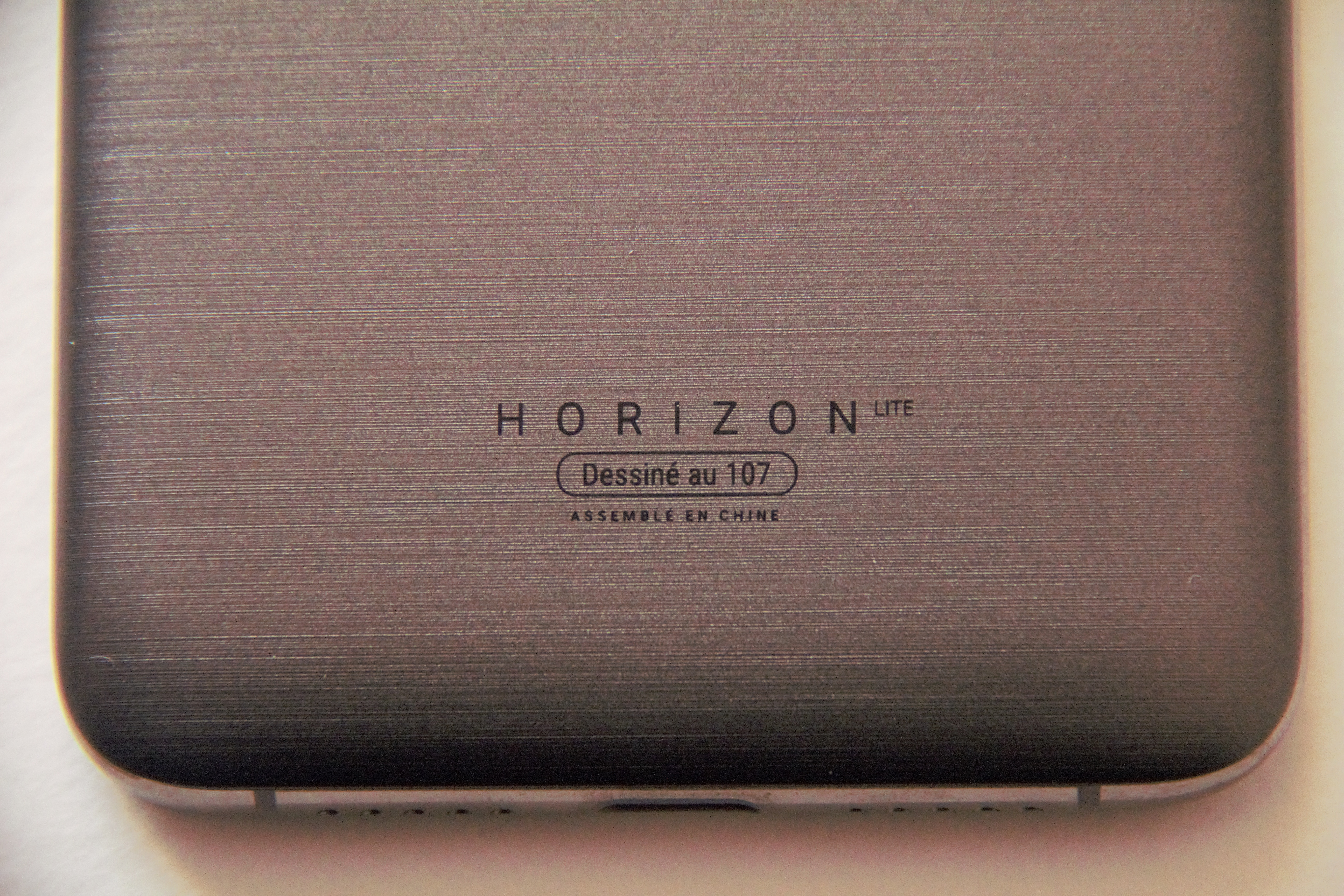 Echo Horizon Lite dessiné au 107